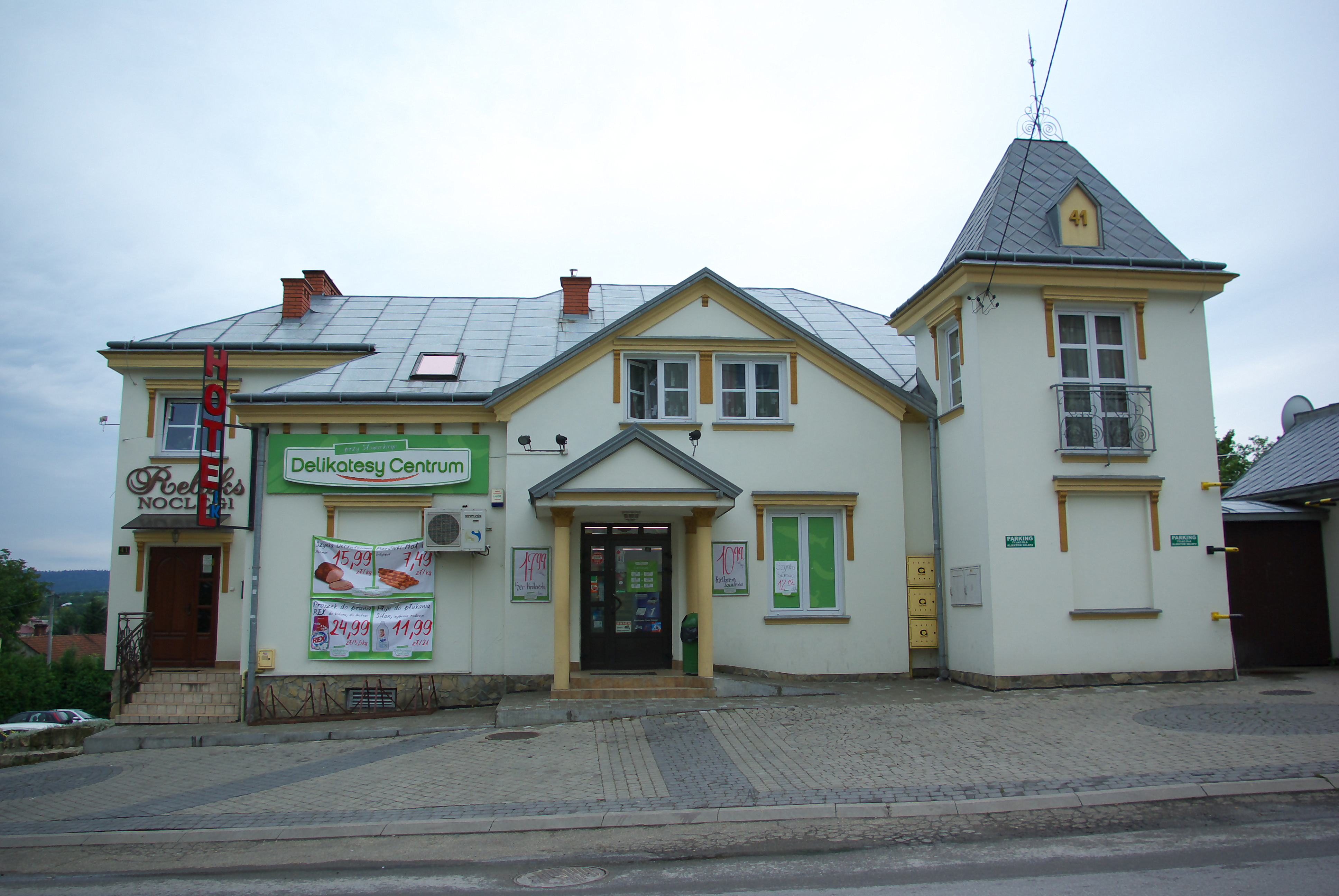 Kamienica przy ul. Słowackiego 41 w Sanoku.